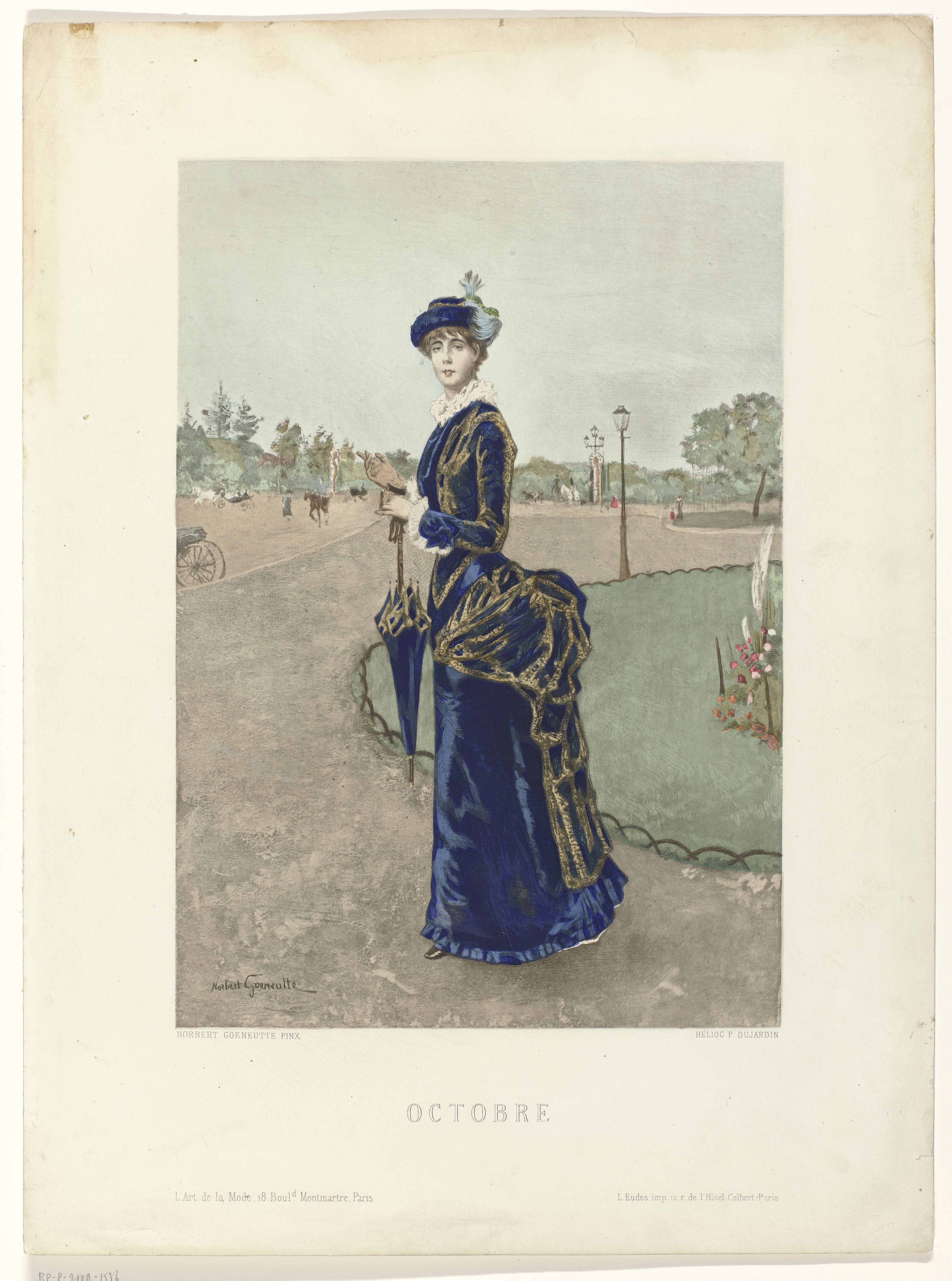 IdentificatieTitel(s): L'Art de la Mode, 1880 : OctobreObjecttype: modeprent Objectnummer: RP-P-2009-1536Opschriften / Merken: onderschrift, midden onder, gedrukt: ‘OCTOBRE’adres, linksonder / rechtsonder, gedrukt: ‘L'ARt de la Mode, 18 Boul.d Montmartre, Paris / L Eudes imp. 12. r. de l'Hôtel Colbert Paris.’Omschrijving: Vrouw in een park, gekleed in een japon met queue. Accessoires: hoed met veren, handschoenen, parasol. Naar het schilderij van Goeneutte: Femme élégante a l'entrée du Bois de Boulogne, 1880VervaardigingVervaardiger: prentmaker: P. Dujardin (vermeld op object)naar schilderij van: Norbert Goeneutte (vermeld op object)drukker: L Eudes (vermeld op object)Plaats vervaardiging: ParijsDatering: 1880Fysieke kenmerken: heliogravureMateriaal: papier Techniek: heliogravureAfmetingen: blad: h 423 mm × b 310 mmOnderwerpWat: fashion platesgloves, mittens, etc. (+ women's clothes)parasol, sunshade (+ women's clothes)public gardens, parkdress, gown (+ women's clothes)head-gear: hat (+ women's clothes)Wanneer: 1880 - 1880Verwerving en rechtenCredit line: Aankoop uit het F.G. Waller-FondsVerwerving: aankoop 30-sep-2009Copyright: Publiek domein